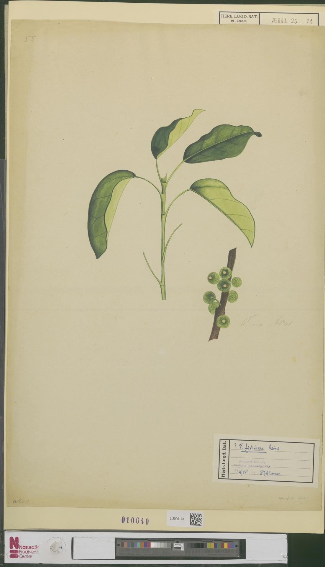 Ficus fistulosa Reinwardt ex Blume